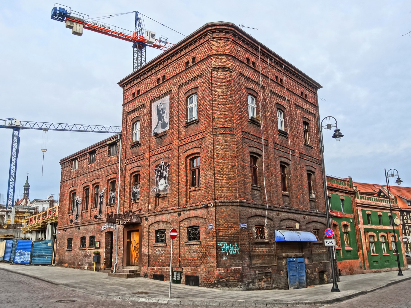 Klub muzyczny Eljazz w Bydgoszczy przy ul. Krętej